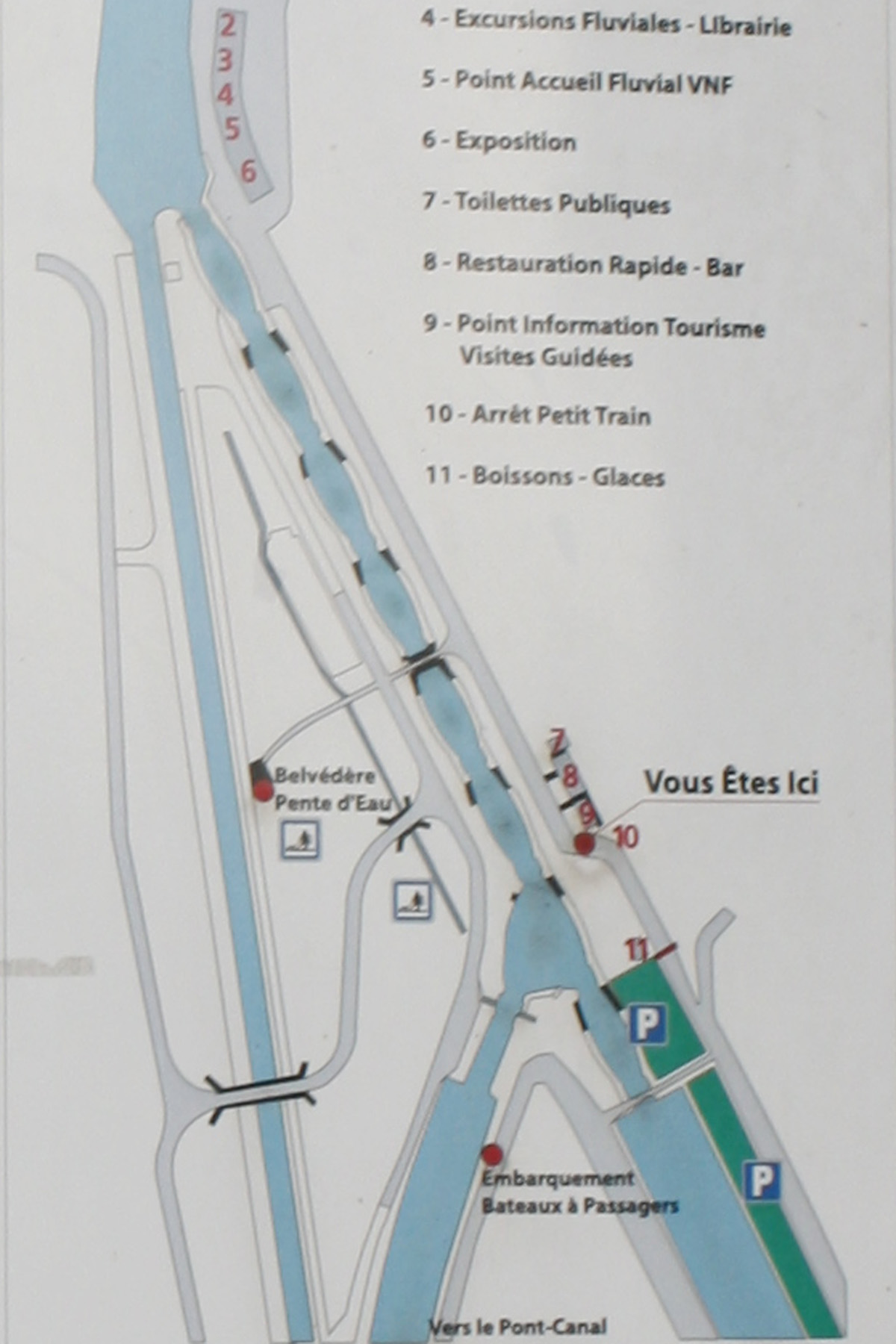 Plan du site (Panneau des Voies Navigables de France)